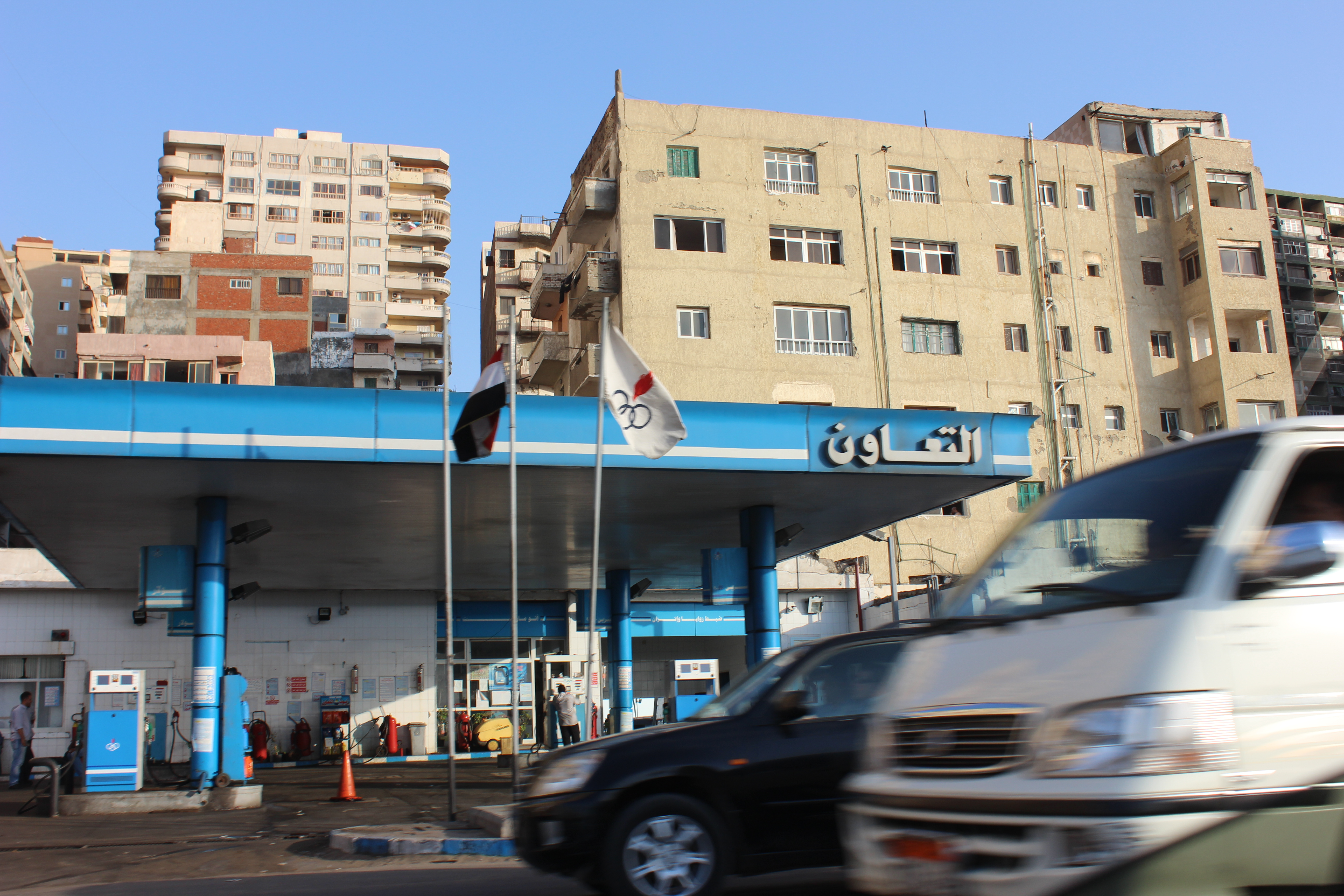 مباني الإسكندرية وبعض العلامات المميزة.